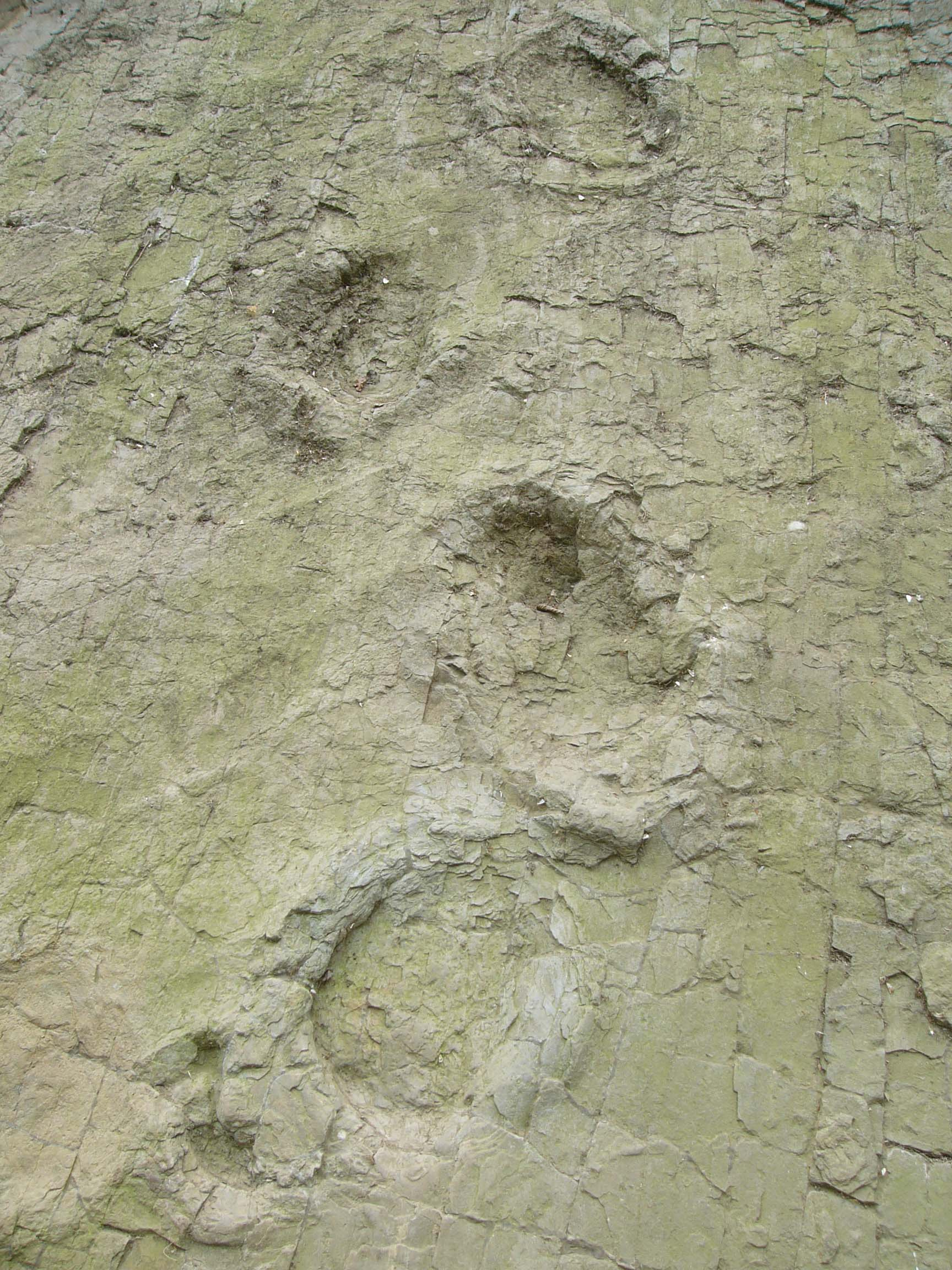 Eine der elf Sauropodenfährten aus Barkhausen (Deutschland), es sind drei große Hinterfuß-Eindrücke sowie unten links ein kleiner Vorderfuß-Eindruck zu sehen.